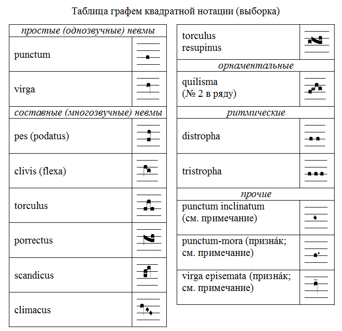 Знаки квадратной нотации (выборка)